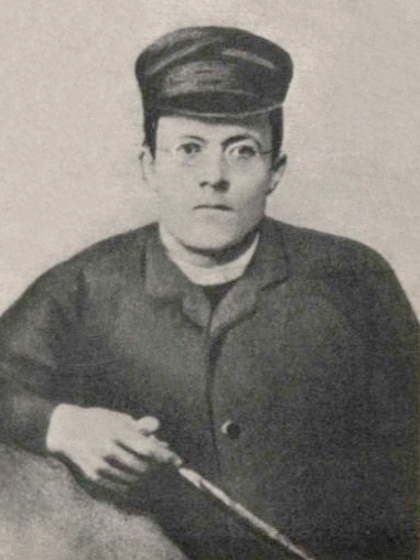 Eduards Veidenbaums (1867 — 1892)